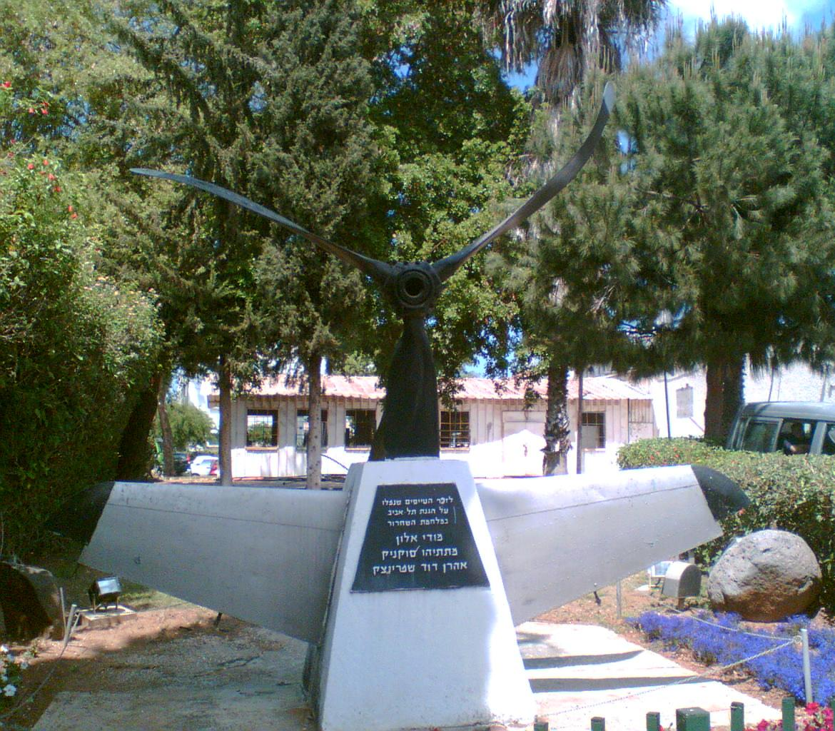 רמת הטייסים (תל אביב): אנדרטה לשלושה טייסים שנפלו במלחמת העצמאות